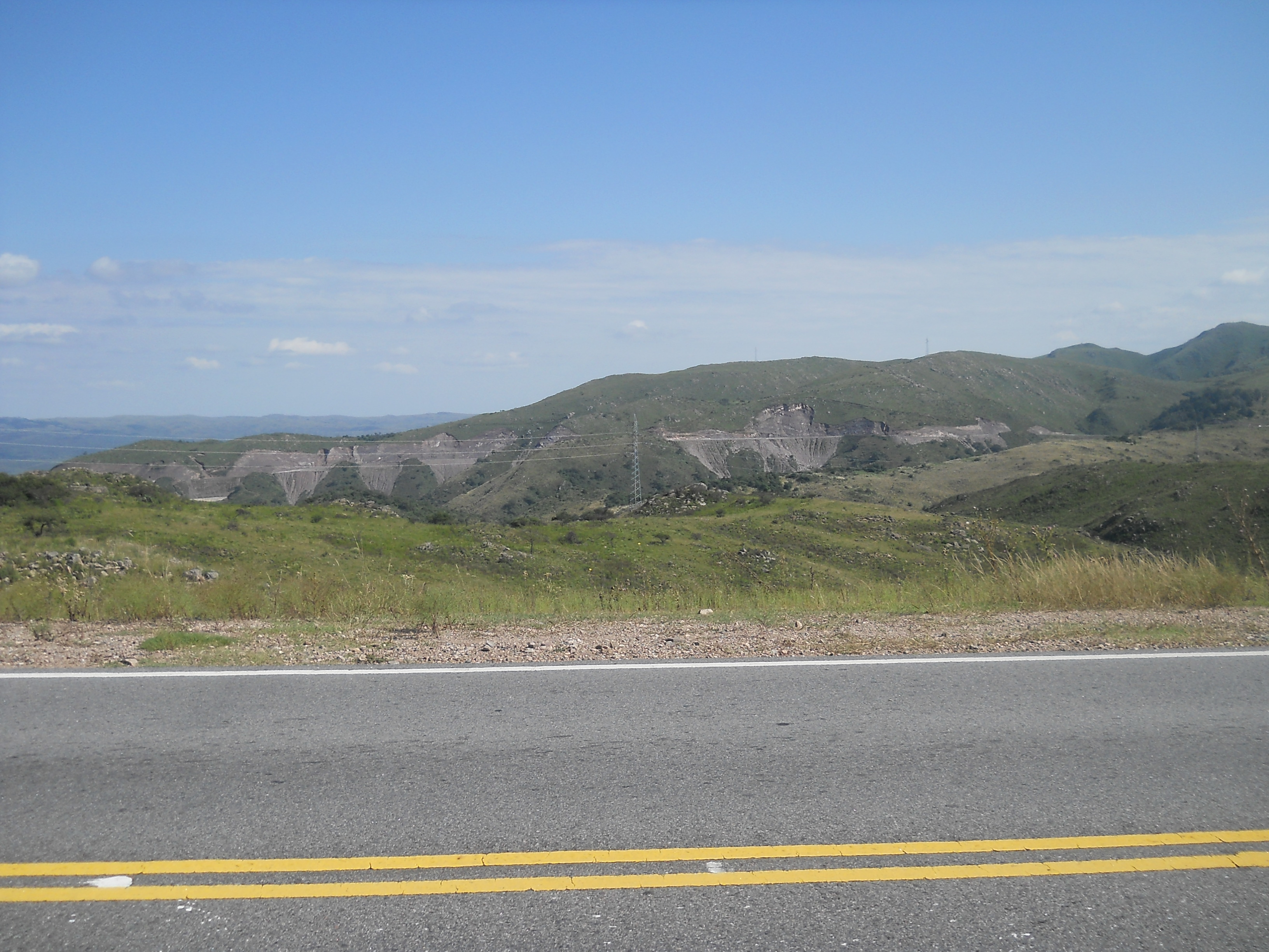 Vista panorámica del Camino del Cuadrado en su descenso hacia el Valle de Punilla